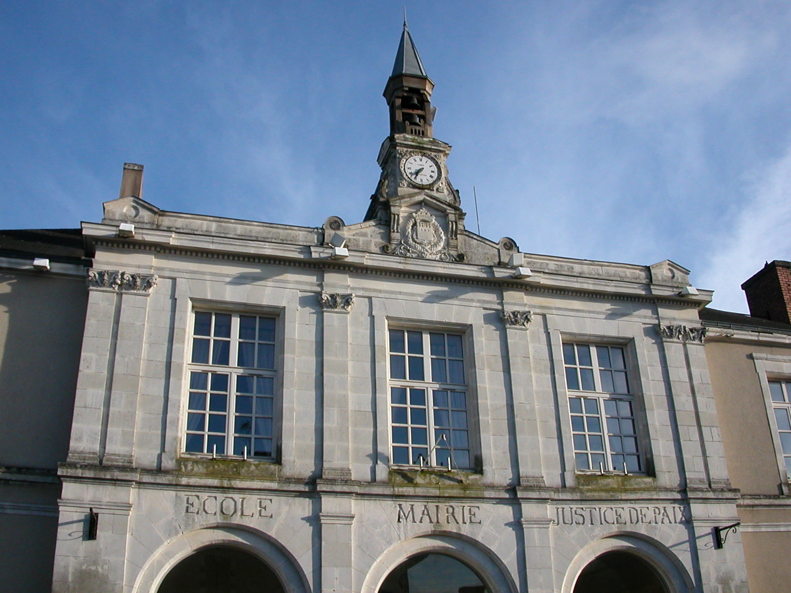 Mairie de Bain-de-Bretagne